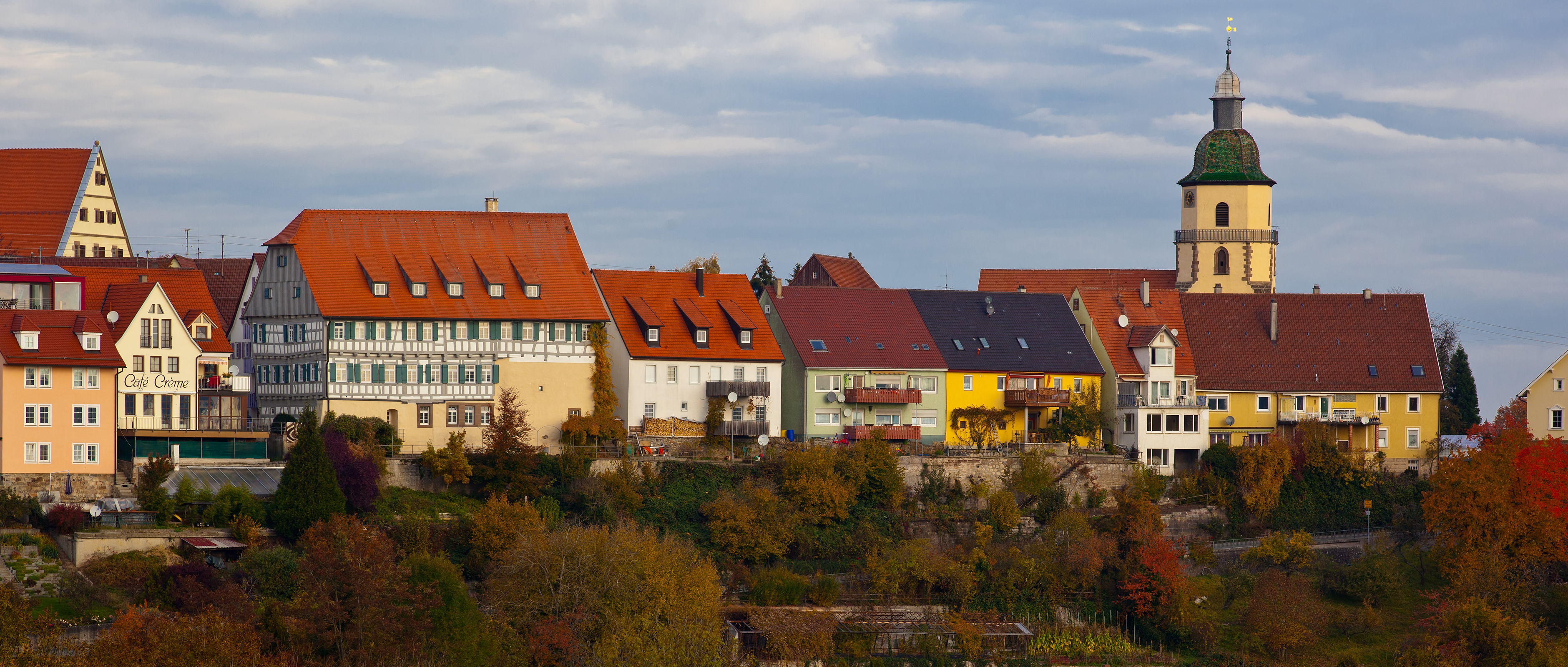 Rosenfeld